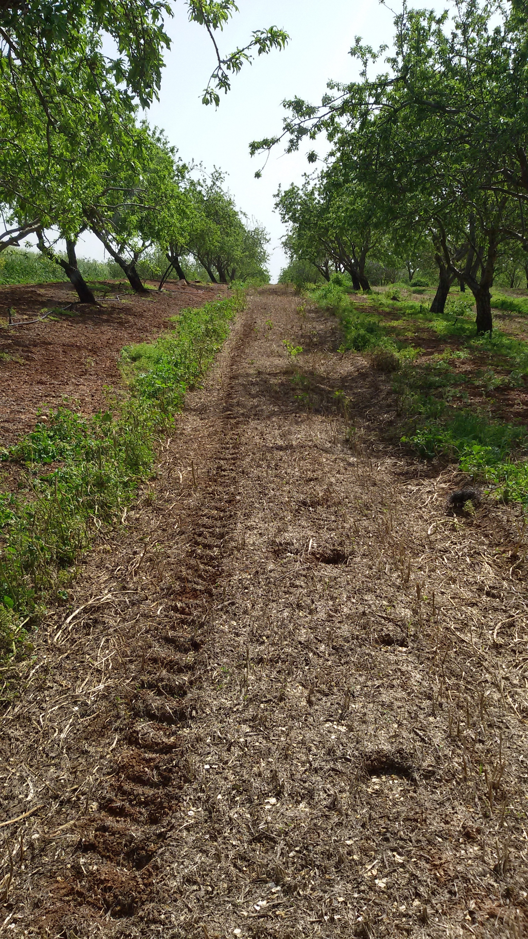 צמחי כיסוי בין שורות של עצי שקד